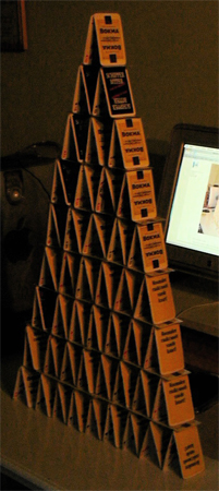 Zelfgemaakt op 27-09-2005. Foto was enigszins onderbelicht en dat is geprobeerd te verbeteren.